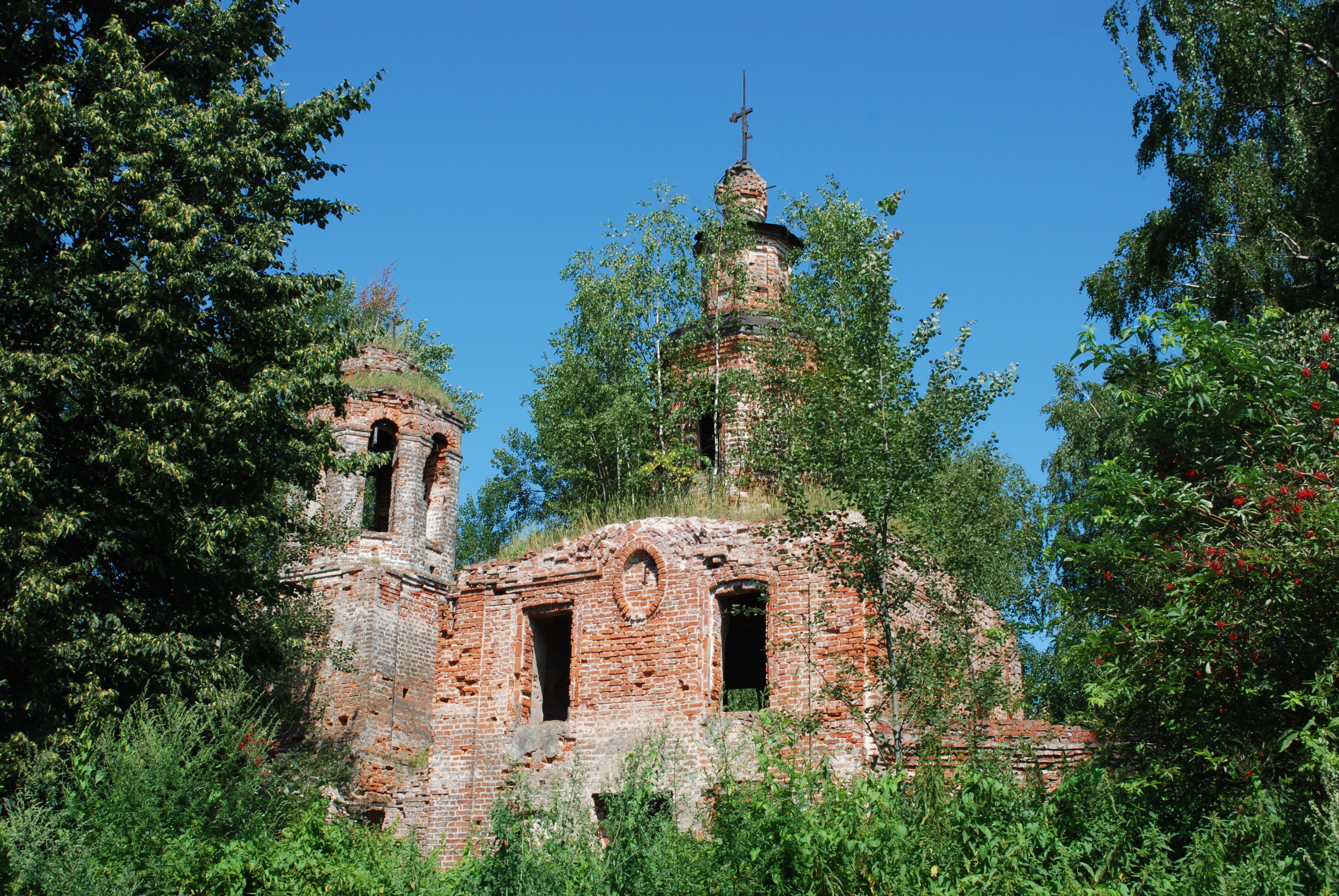 Церковь никольская (Смоленская область, Гагаринский район, село Потапово)